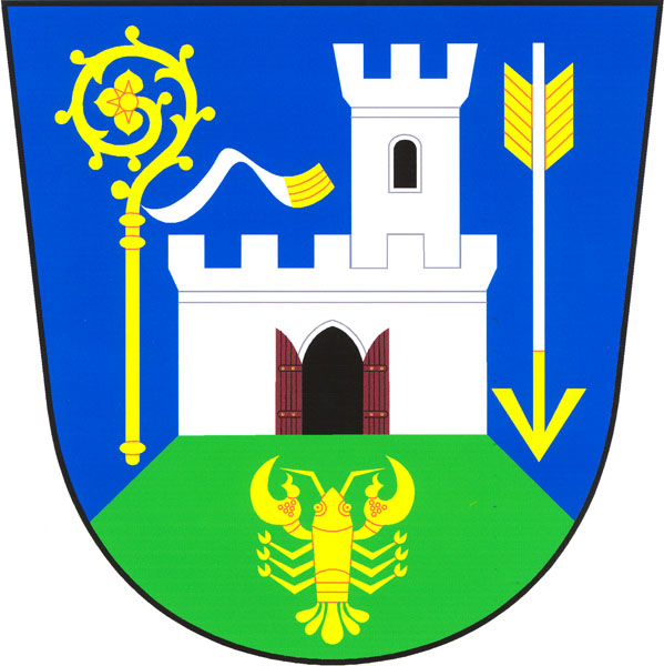 Znak obce Újezd u Tišnova